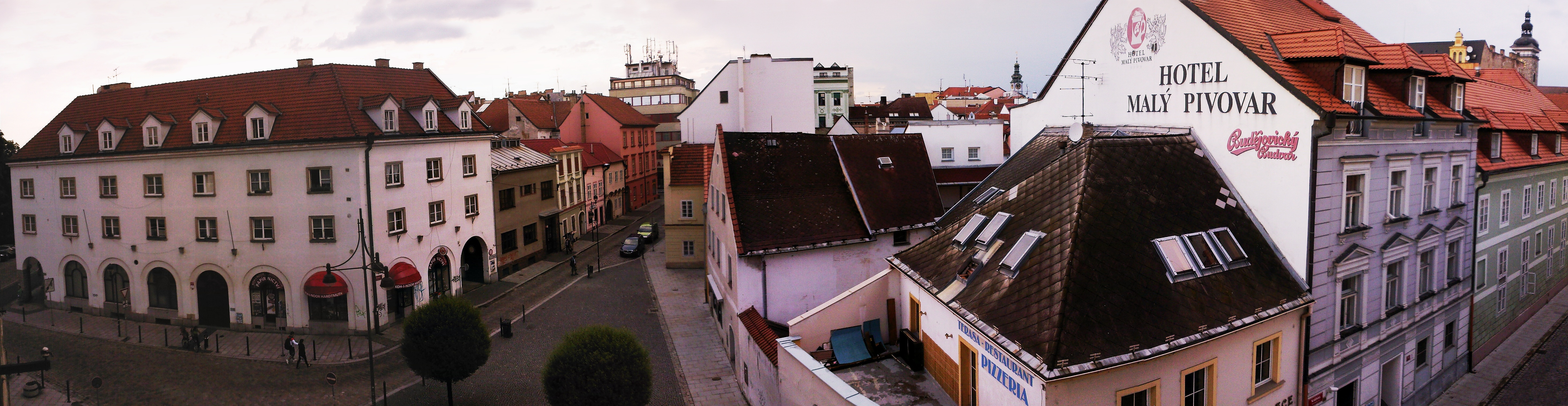 České Budějovice - Široká ulice